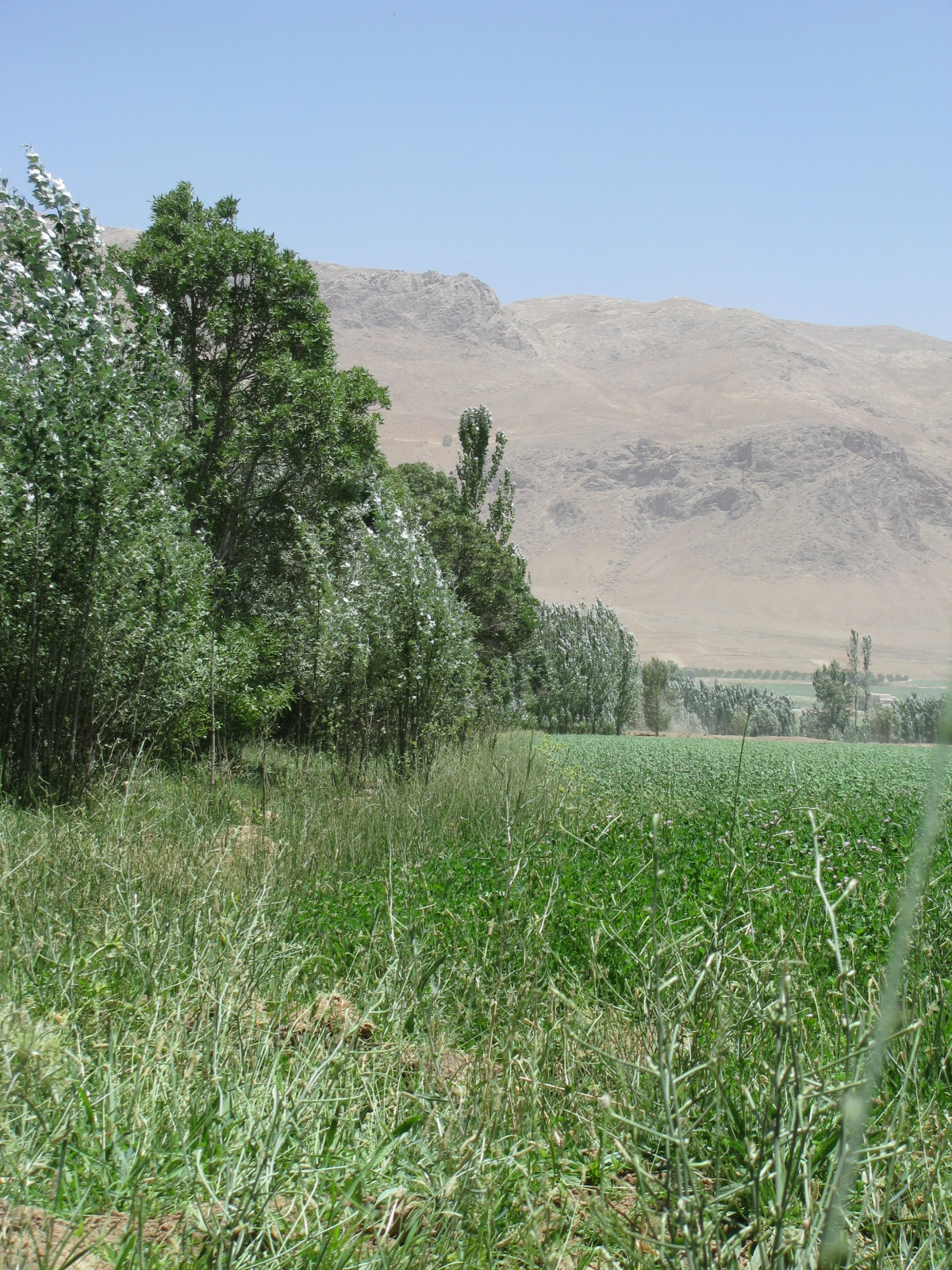 نمایی از طبیعت حومه ی بلداجی